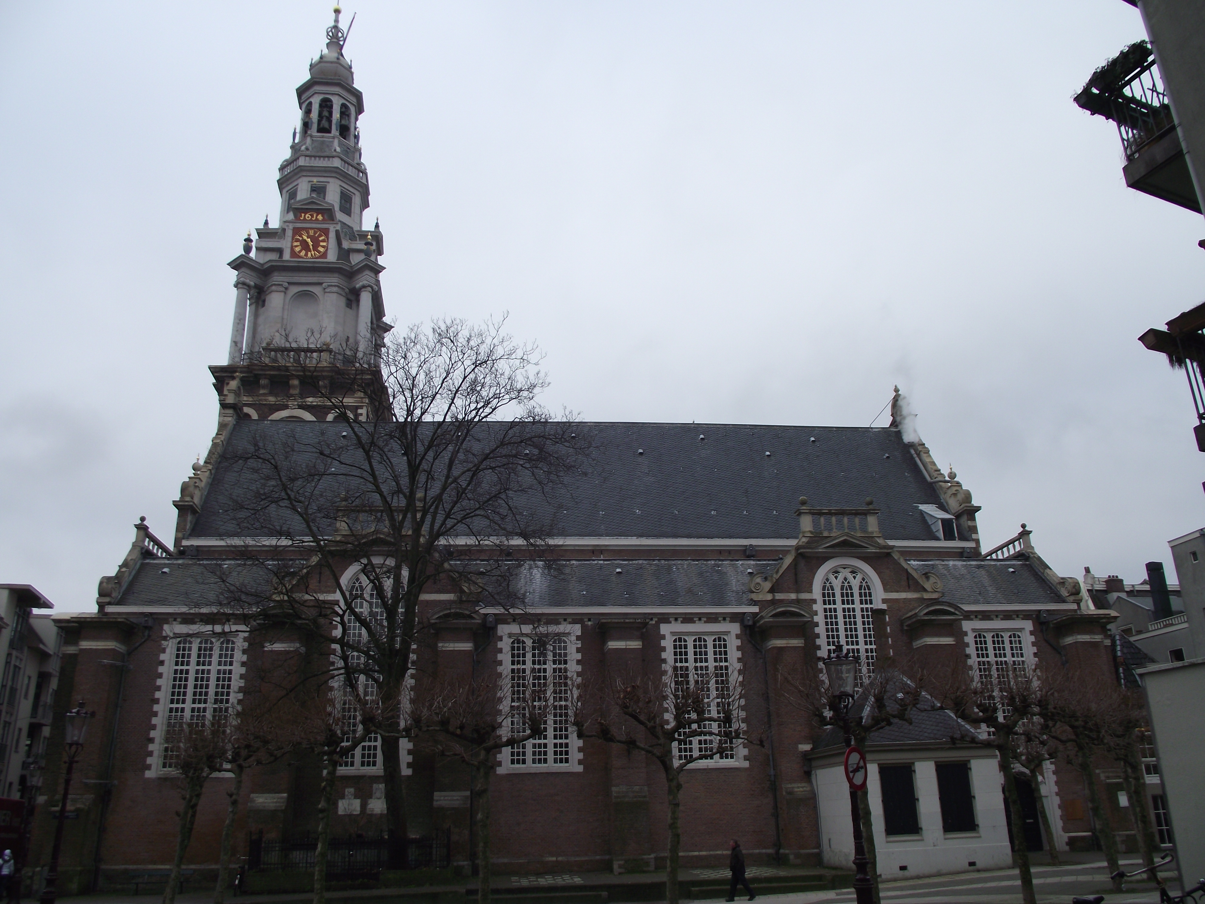 Amsterdam, Zuiderkerk, H.de Keyser, 1611-14